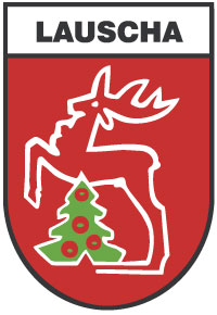 Stadtwappen von Lauscha